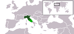 locatie van de Italiaanse Sociale Republiek, zelf gemaakt (bewerking van nl::Afbeelding:Locatie Italië.png)